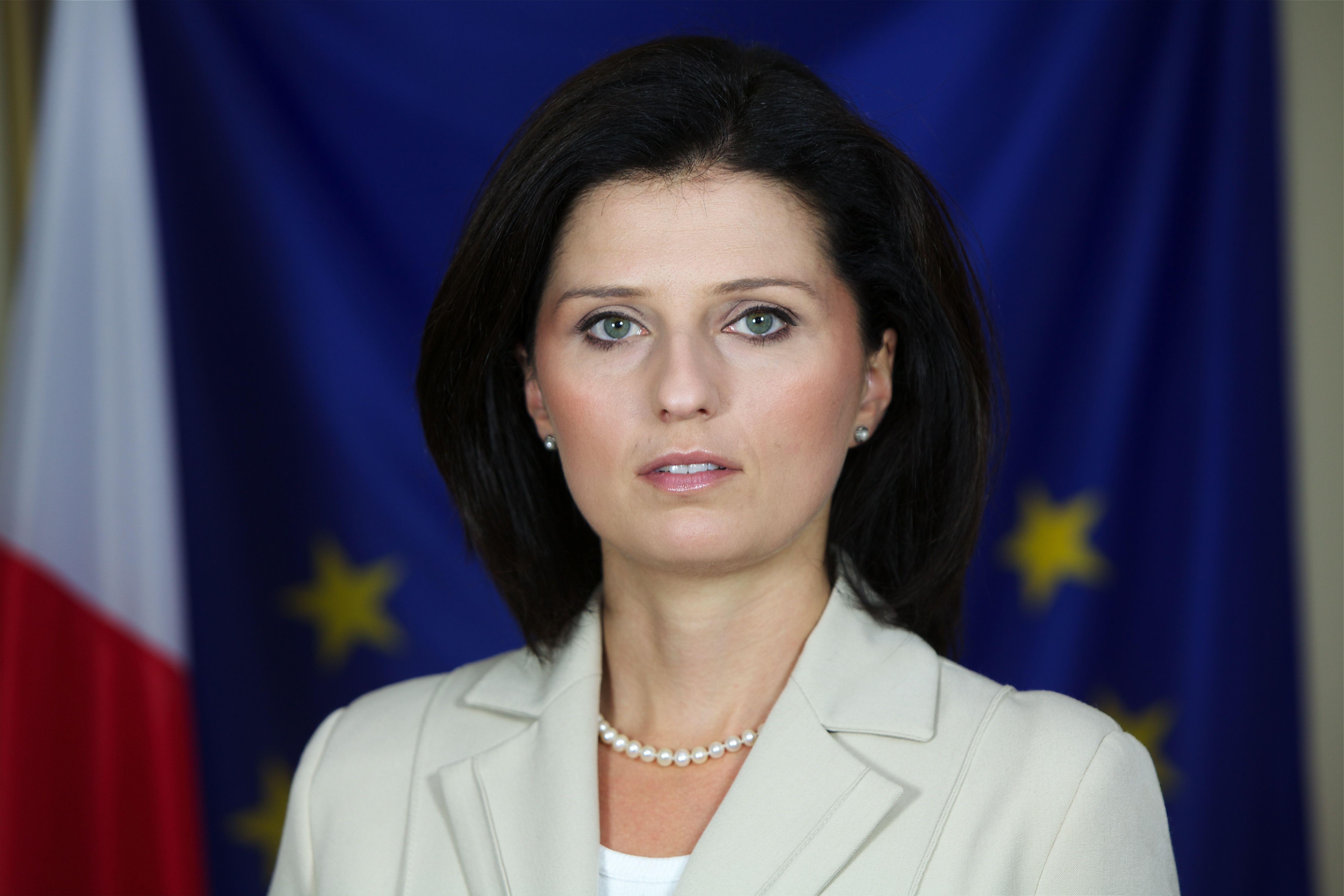 Ilona Antoniszyn-Klik